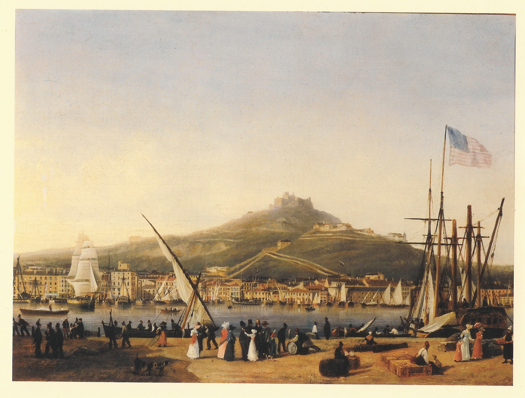 Vue de l'Hôtel de ville de Marseille vers fr:1820. Huile sur toile peinte par Louis Garneray. - Chambre de commerce de Paris